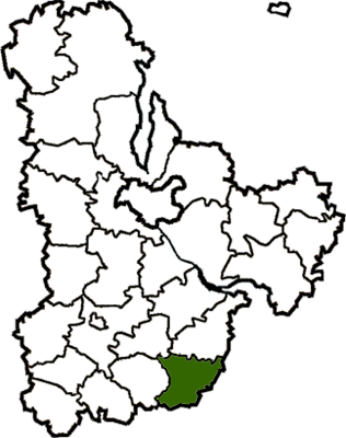 Boguslavskyi-Raion map